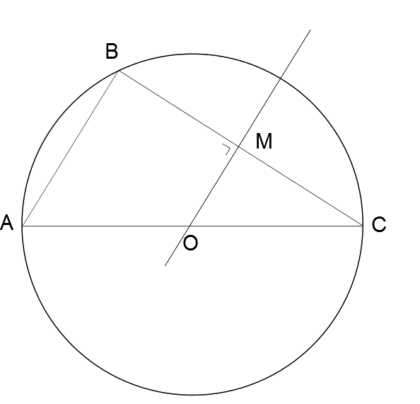 Bewijs van stelling van Thales voor cirkels met behulp van de stelling van Thales voor rechten. Created with Inkscape